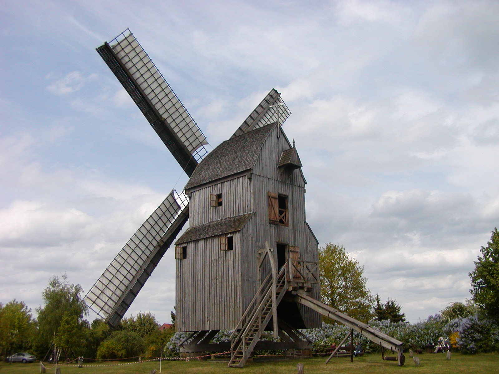 Bockwindmühle Oppenwehe This image shows a heritage building in Germany, located in the North Rhine-Westphalian city Stemwede (no. 019).